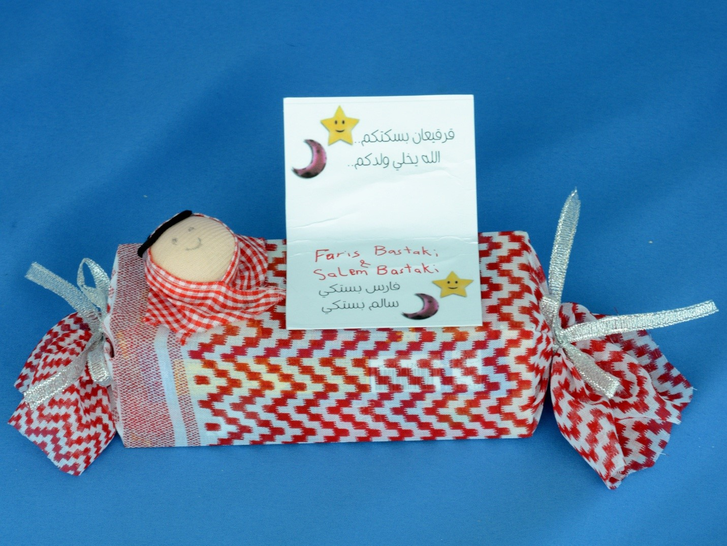 girgian verpakking